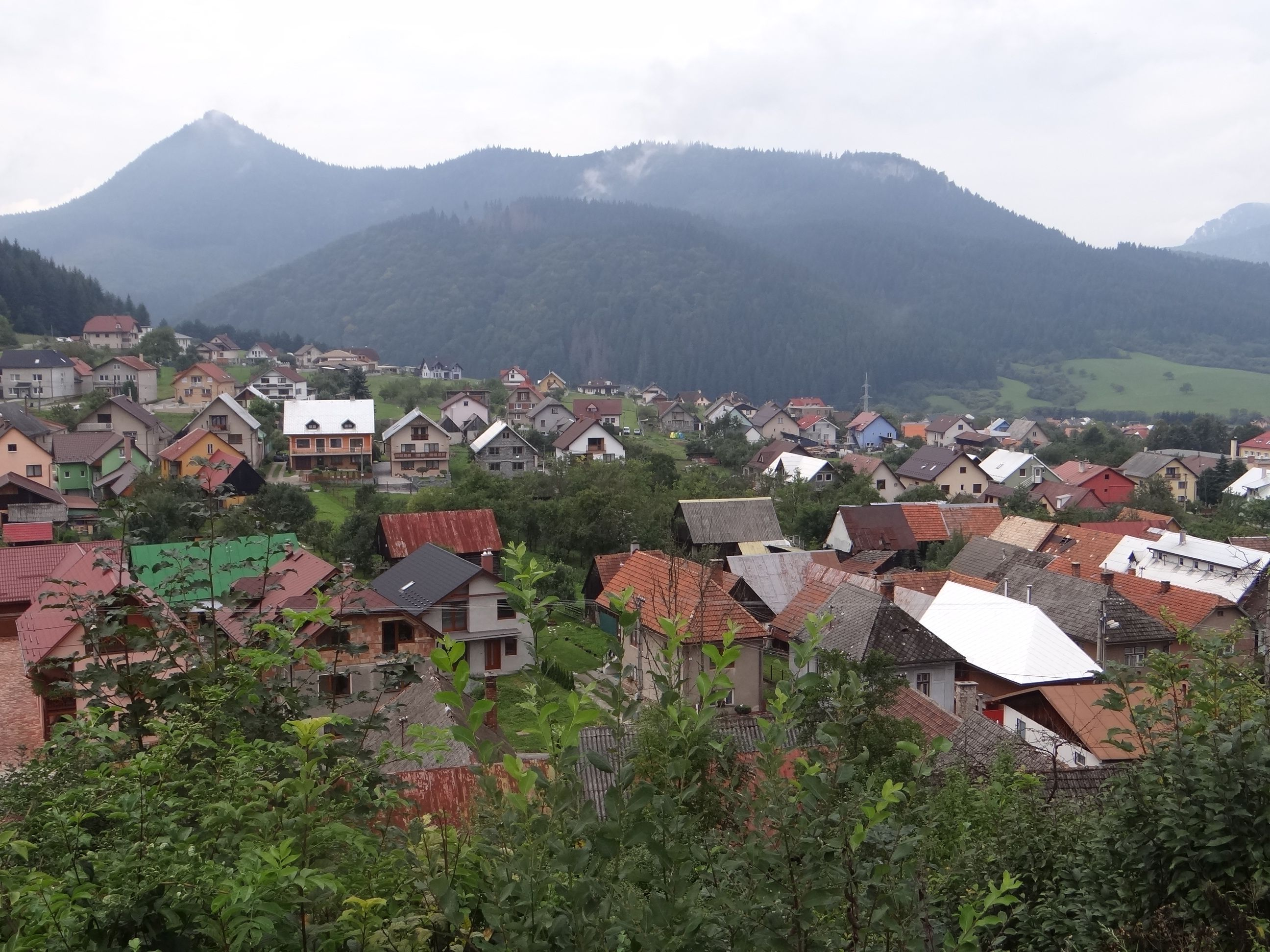 Komjatná